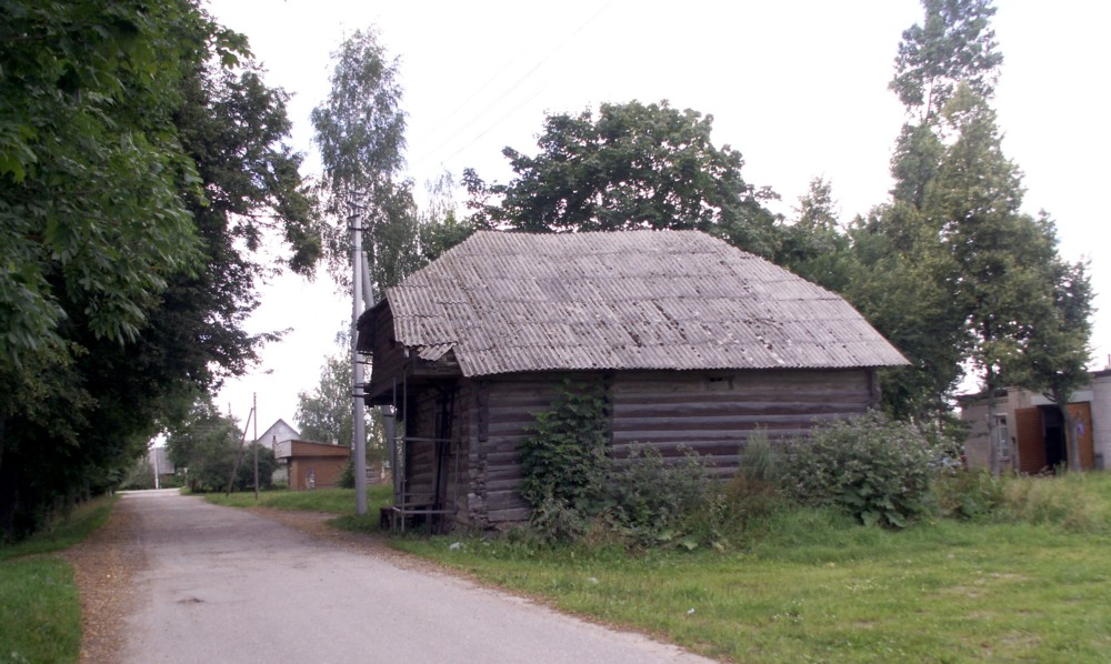 Bazilionai